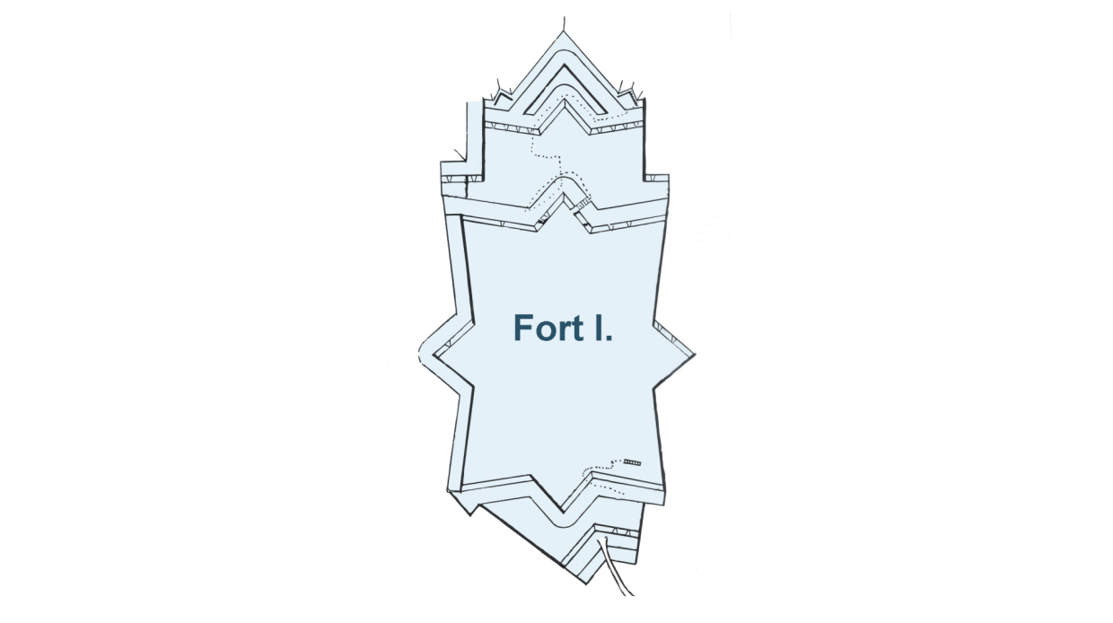 Befestigungsanlagen auf dem Klüt, Fort I.